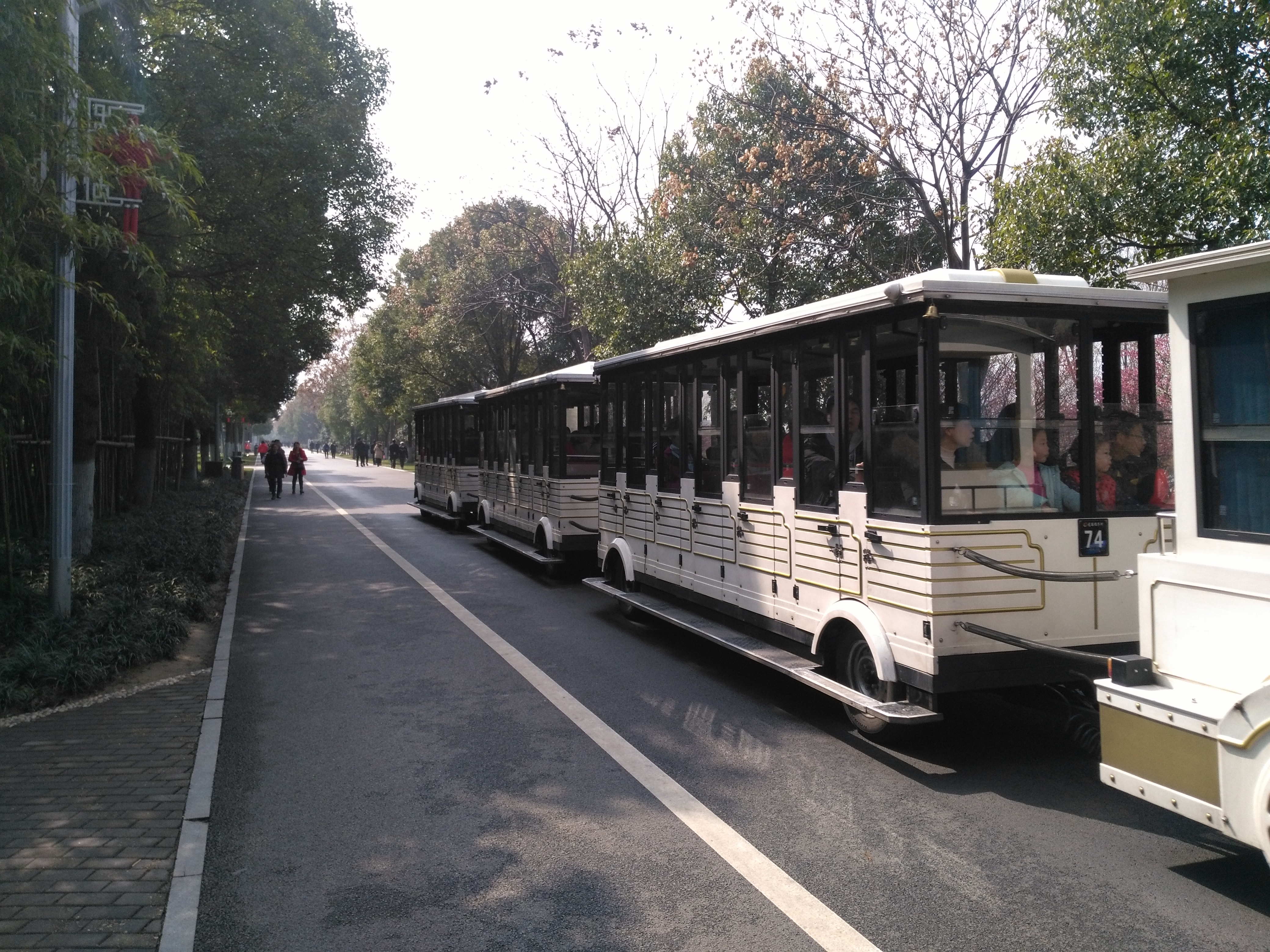 长沙市橘子洲风景区内的“观光小火车”